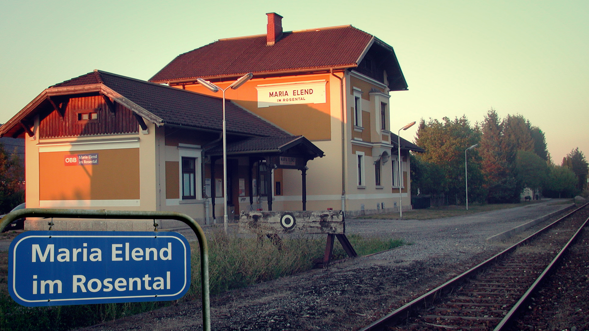 Am Bahnhof von Maria Elend - der im Film die Grenzstation Altstätten in der Schweiz darstellt - wurde die dramatische Schlußszene für den Film "Wie ein Licht in dunkler Nacht / Shining Through" im November 1990 gedreht.